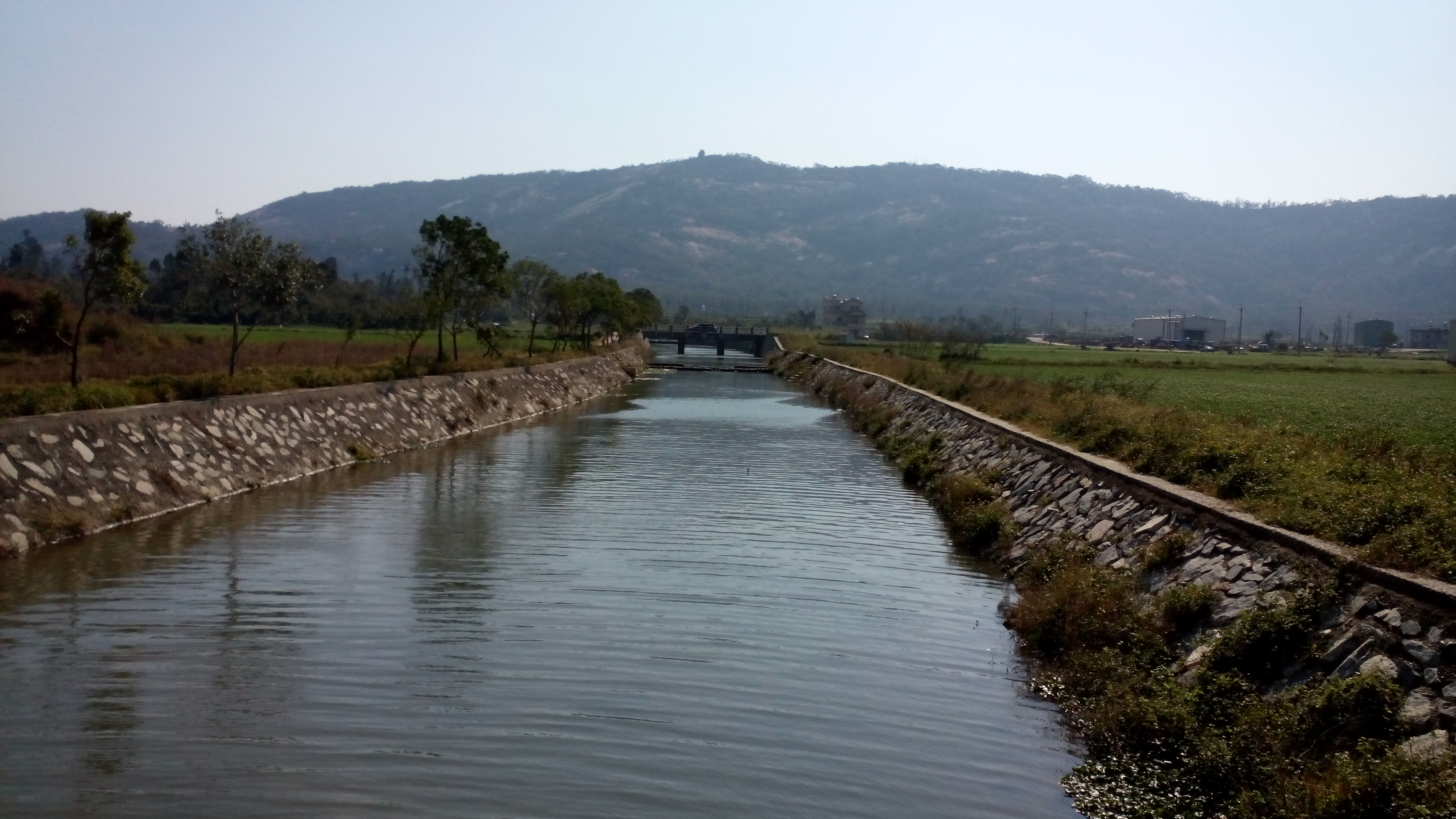 高陽路拍攝太武山一角